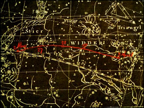 Christian Friedrich Goldbach, Neuester Himmels‐Atlas, Weimar, 1803 Von Franz Xaver von Zach revidiert und mit einer Einleitung versehen.